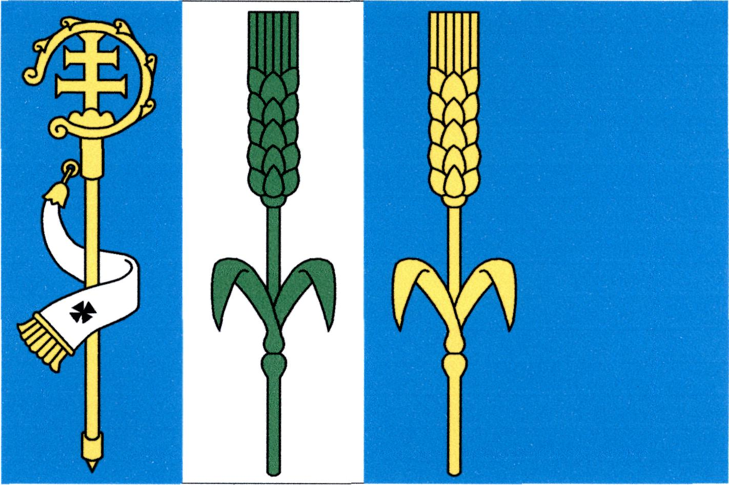 Vlajka obce Výškov